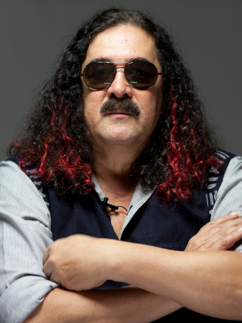 Moraes Moreira (1947-2020), músico e integrante do conjunto musical Novos Baianos, em entrevista ao projeto Produção Cultural no Brasil.